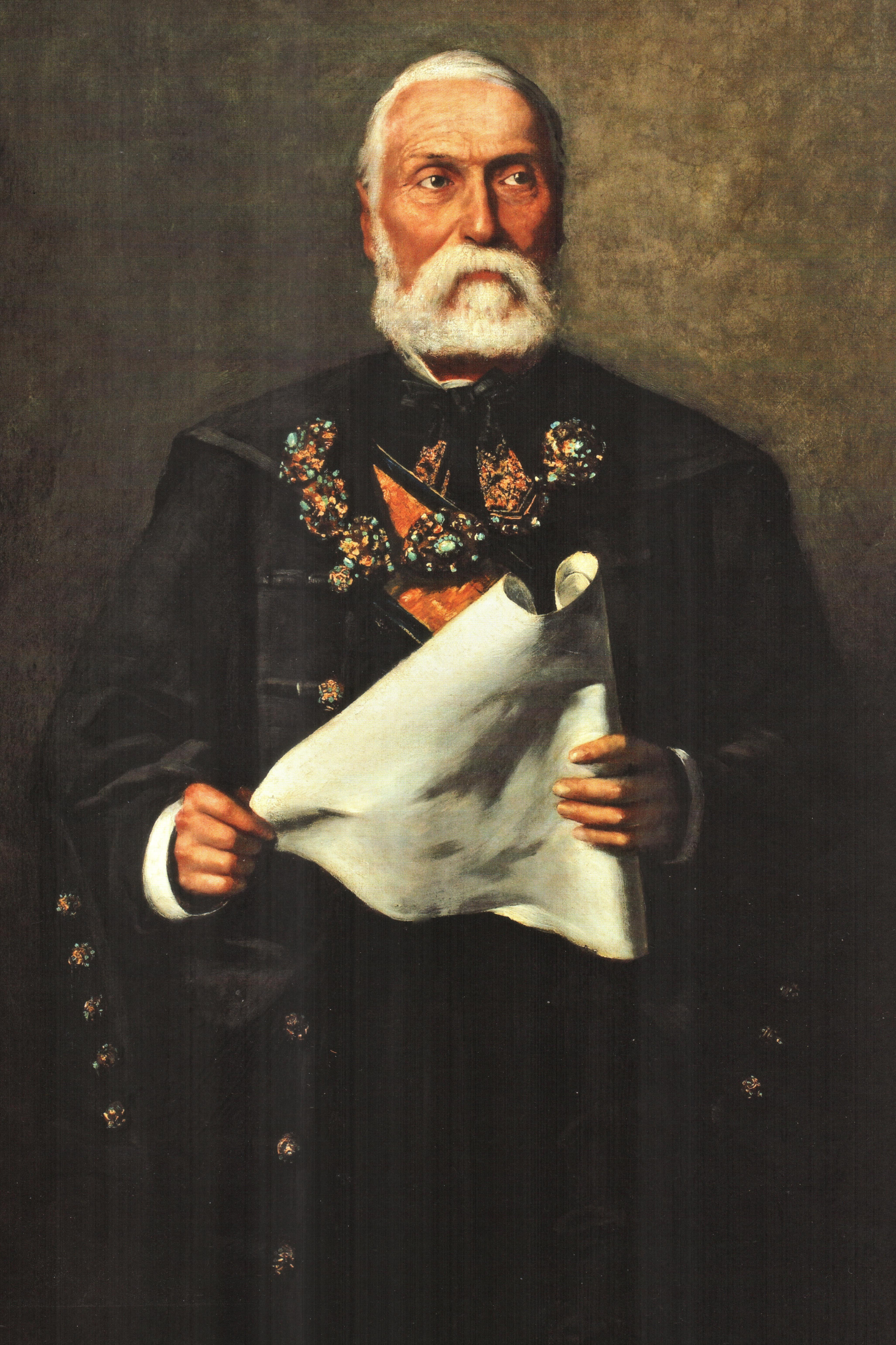 Trefort Ágoston. Forrás: Rubicon (történelmi magazin) 2013/2-3 szám ISSN 0865-6347 - 116. oldal